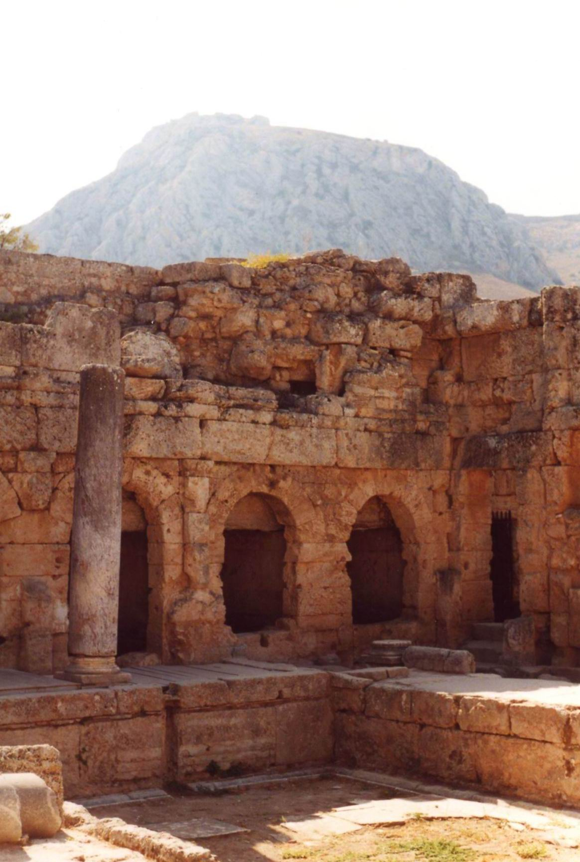 Antikes Korinth: Peirene-Brunnen